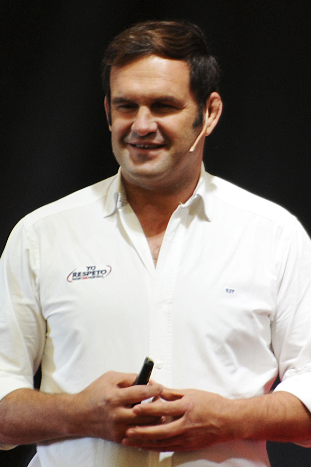 Juan Bautista Segonds, coach holístico, conferencista y fundador de Rugby Sin Fronteras